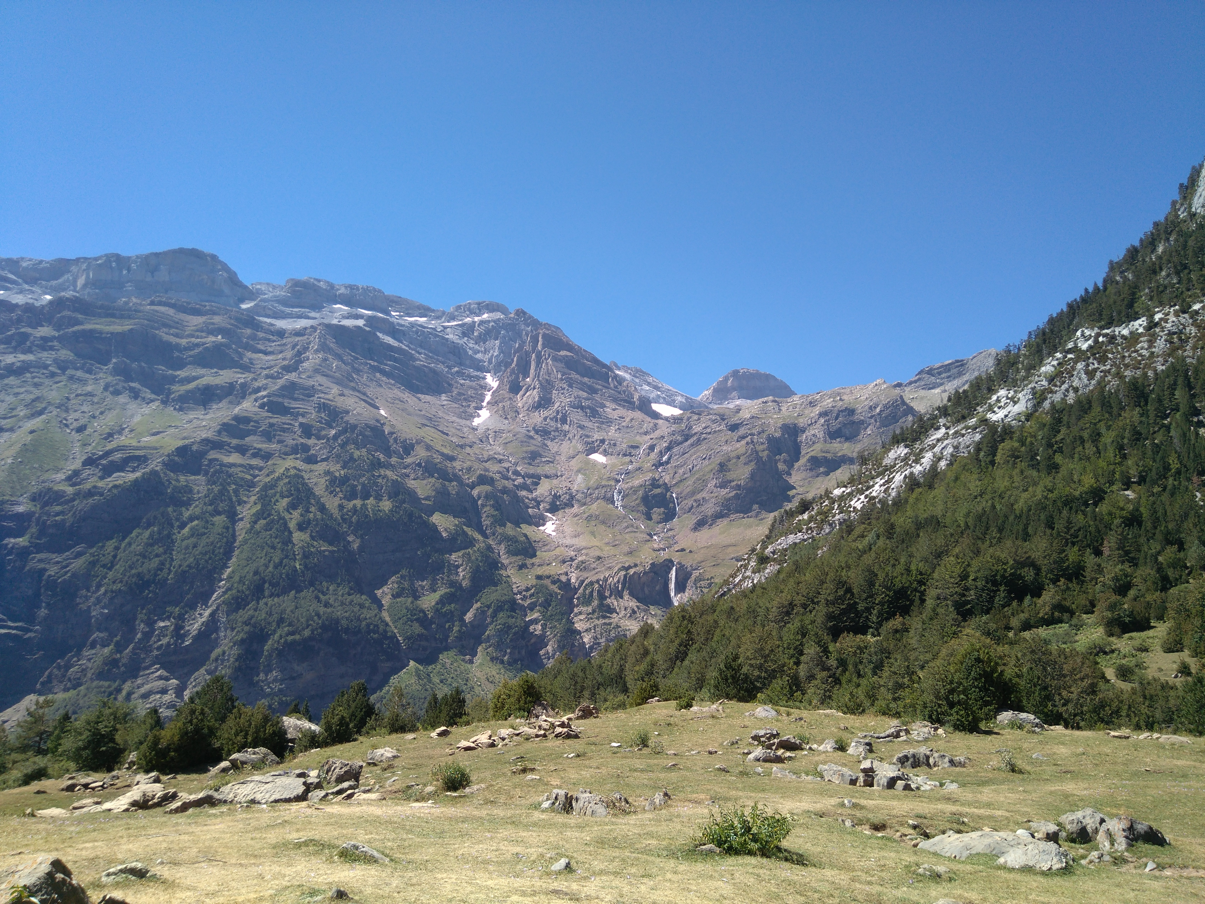 Vista del Circo de Pineta y del Pico Cilindro desde los Llanos de La Larri. Agosto 2017